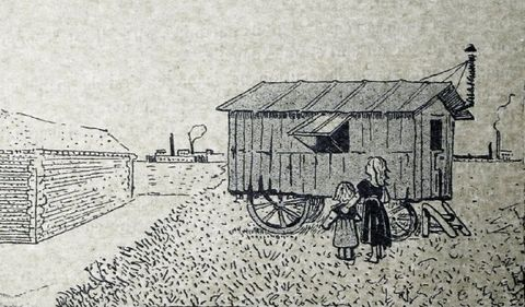 noir & blanc